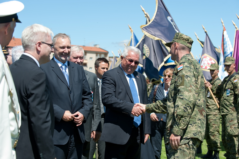 16. obljetnica vojnoredarstvene operacije Oluja u Kninu